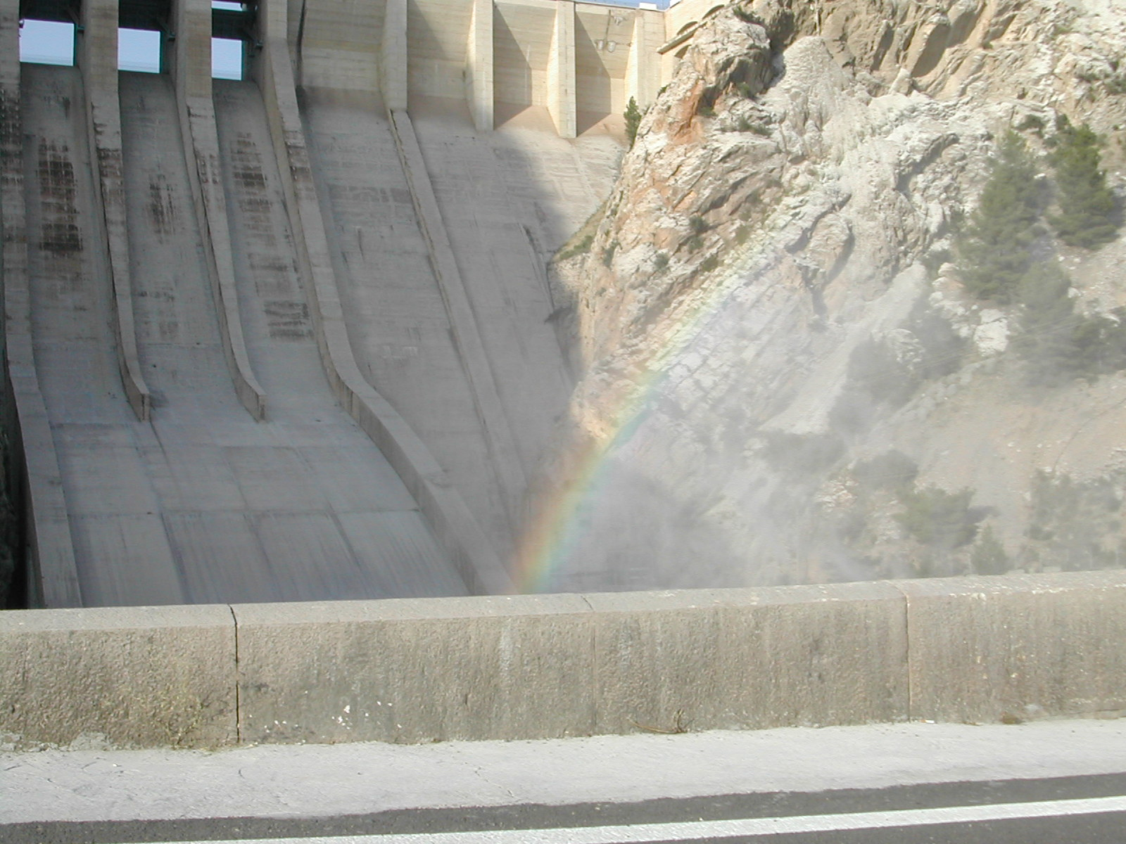 Pantà de Contreras